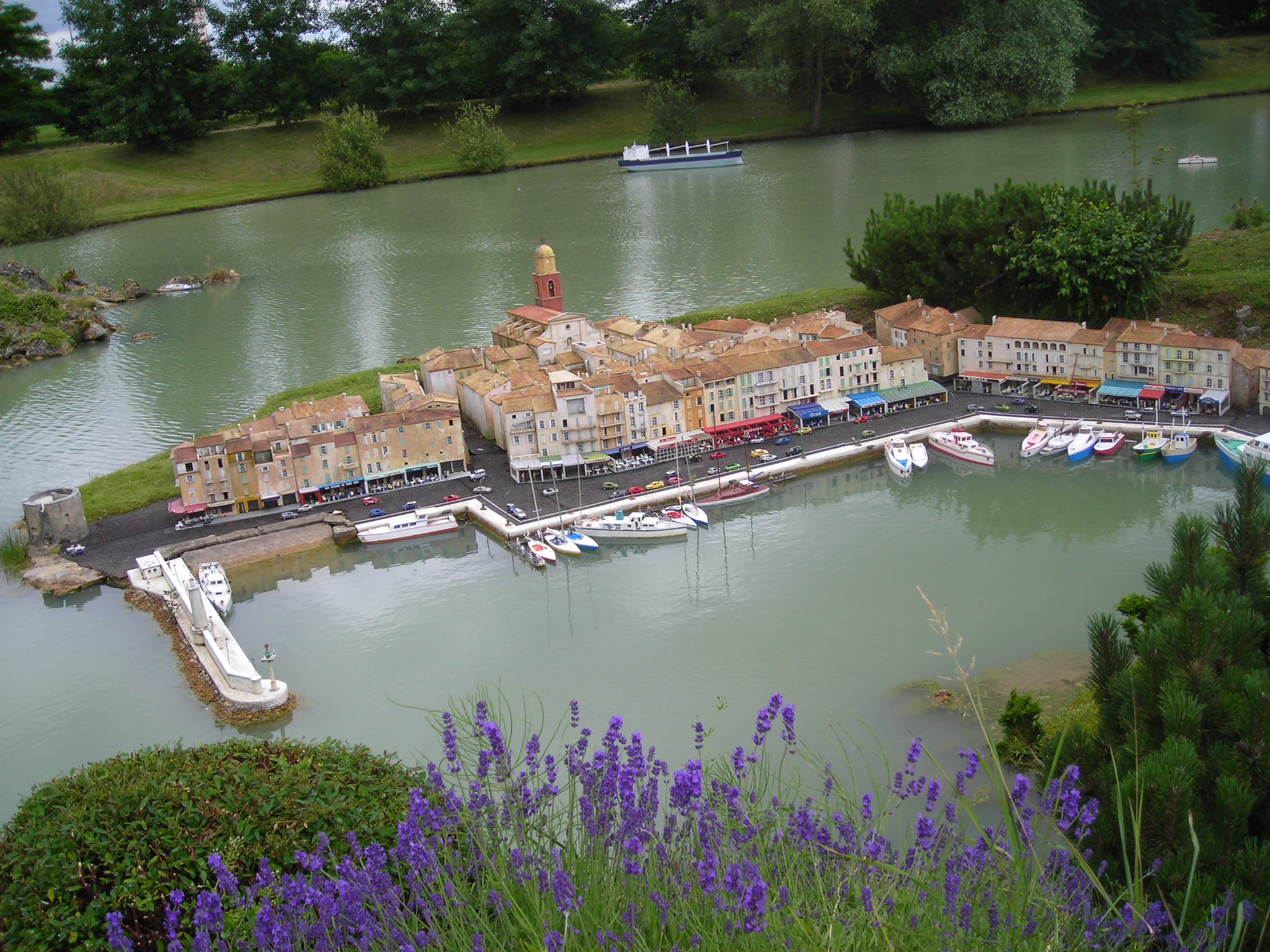 Maquette de Saint Tropez à France Miniature (Élancourt)